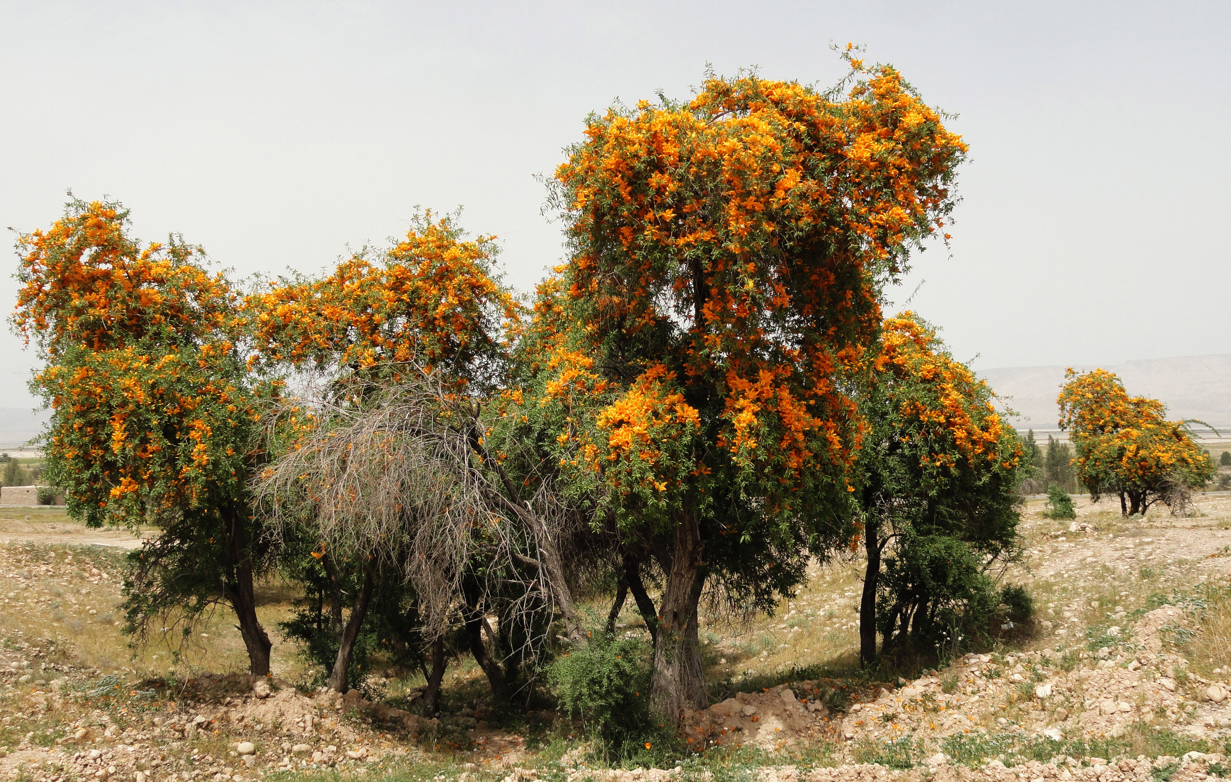 درخت انار شیطان (سمنگ)در بخش علامرودشت، شهرستان لامرد، استان فارس